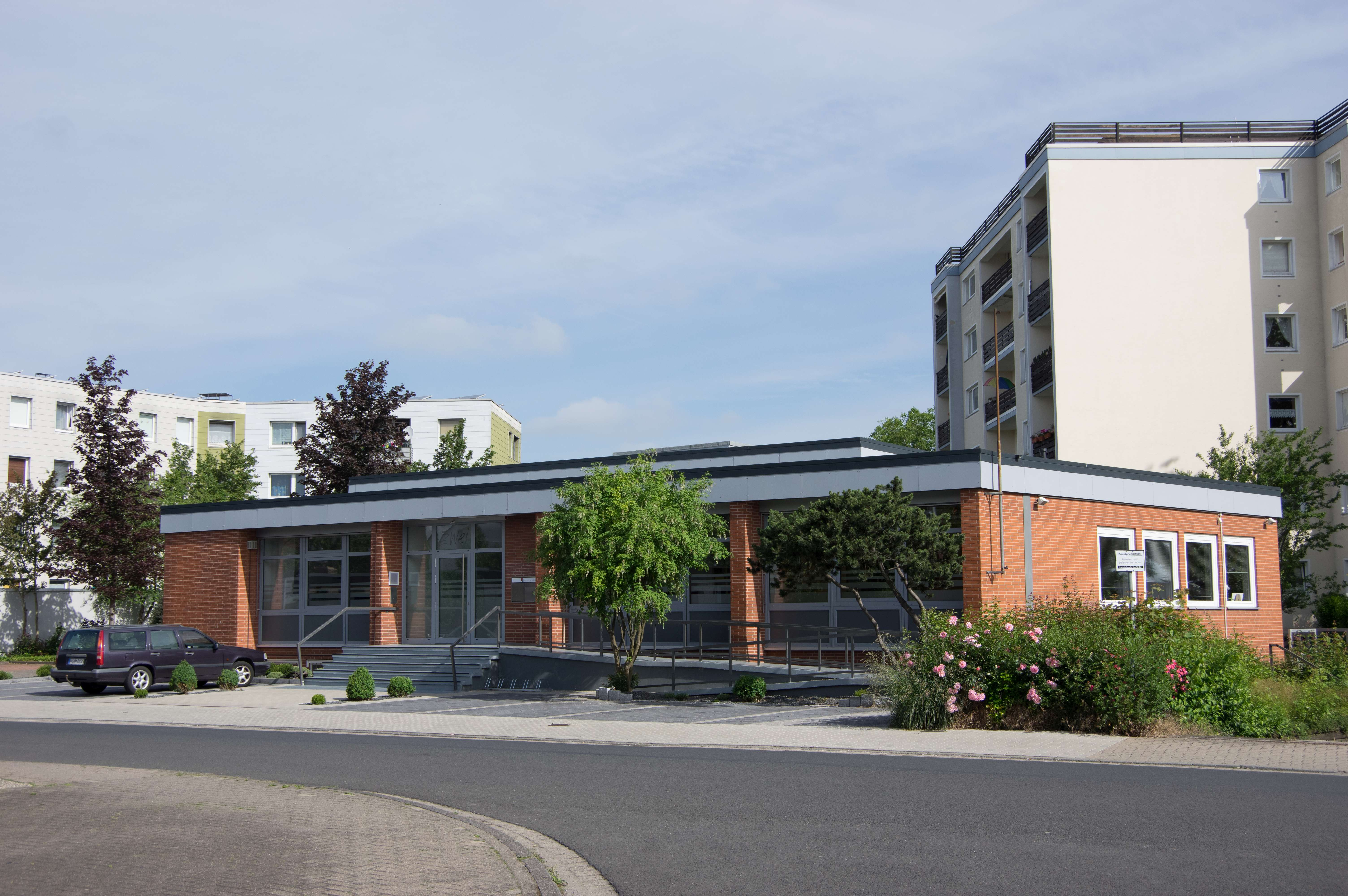 Pattensen in Niedersachsen. Die Media-Manufaktur ist ein Verlag in Pattensen.